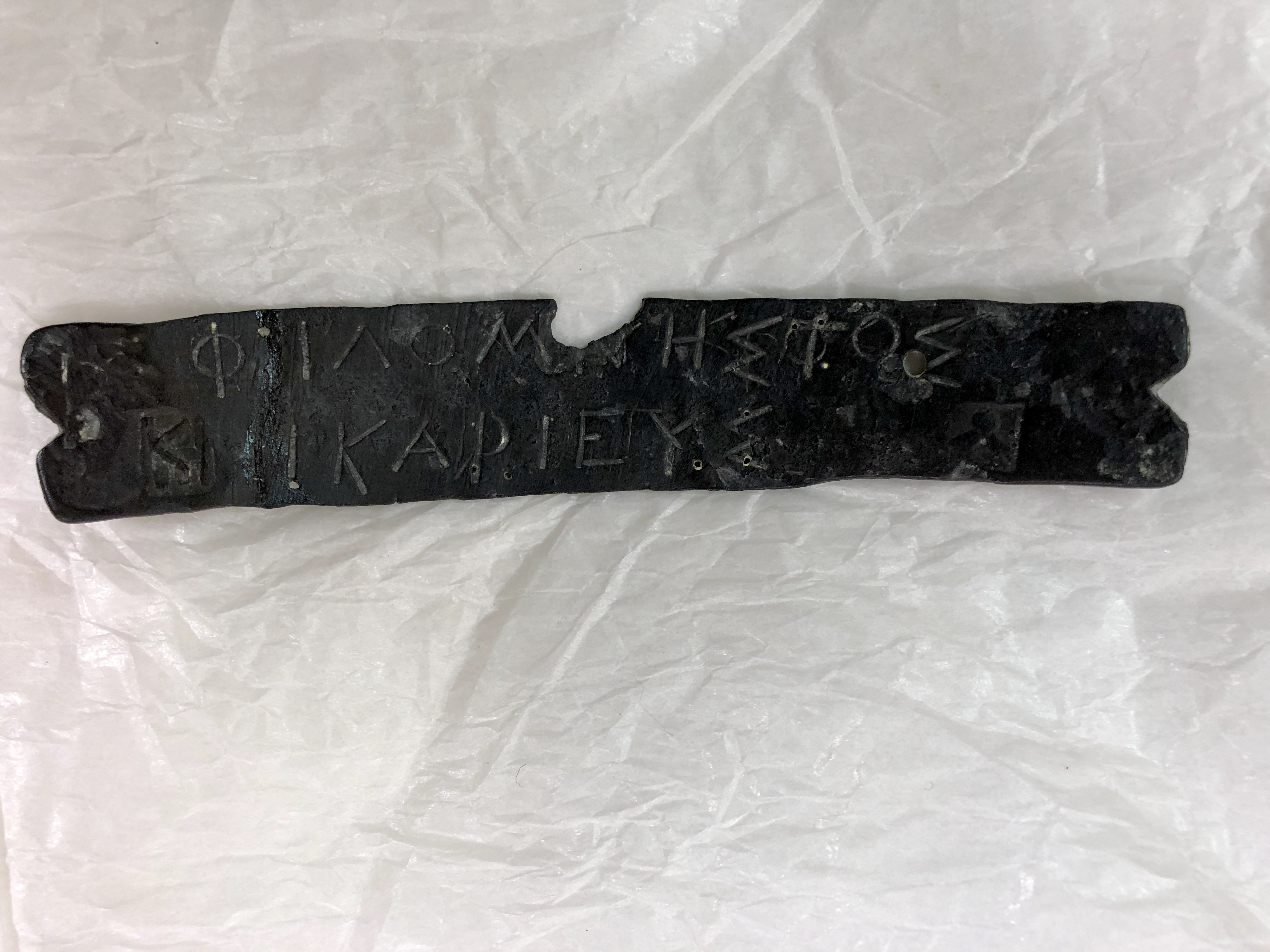 Pinakion in bronzo, Museo dell’Agora di Atene.